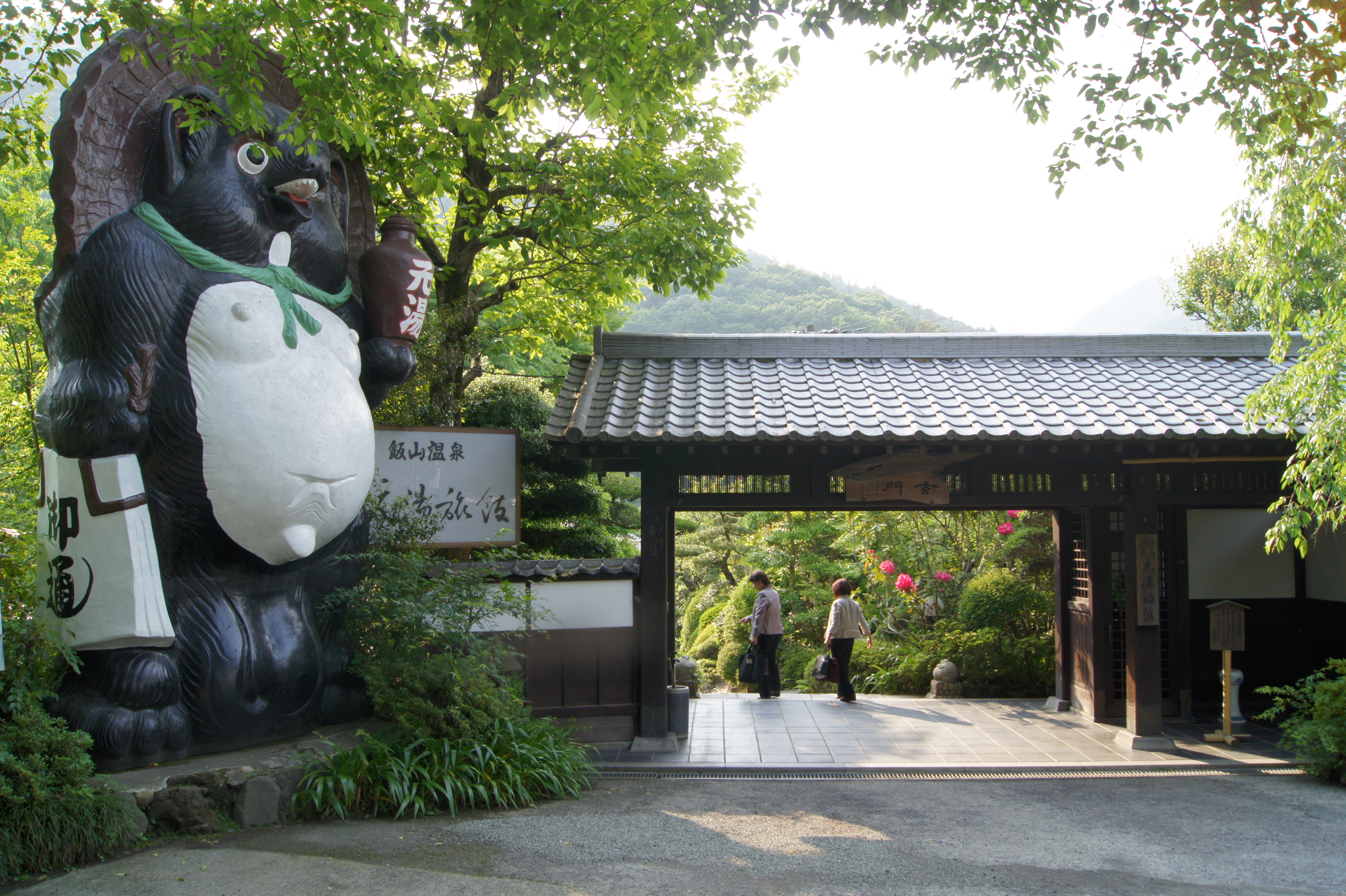 飯山温泉元湯旅館の入り口